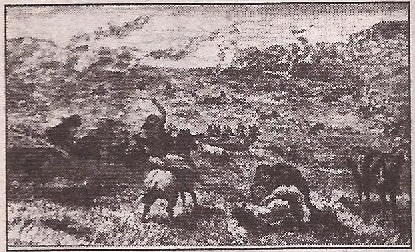 Caza de guanacos y avestruces, valle del río Chico, Chubut, Argentina (Musters, 1873). Frontispicio.